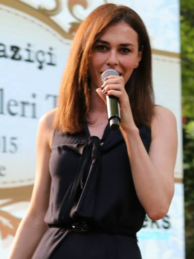 Ayşe Hatun Önal, 12. Radyo Boğaziçi Müzik Ödülleri'nde.